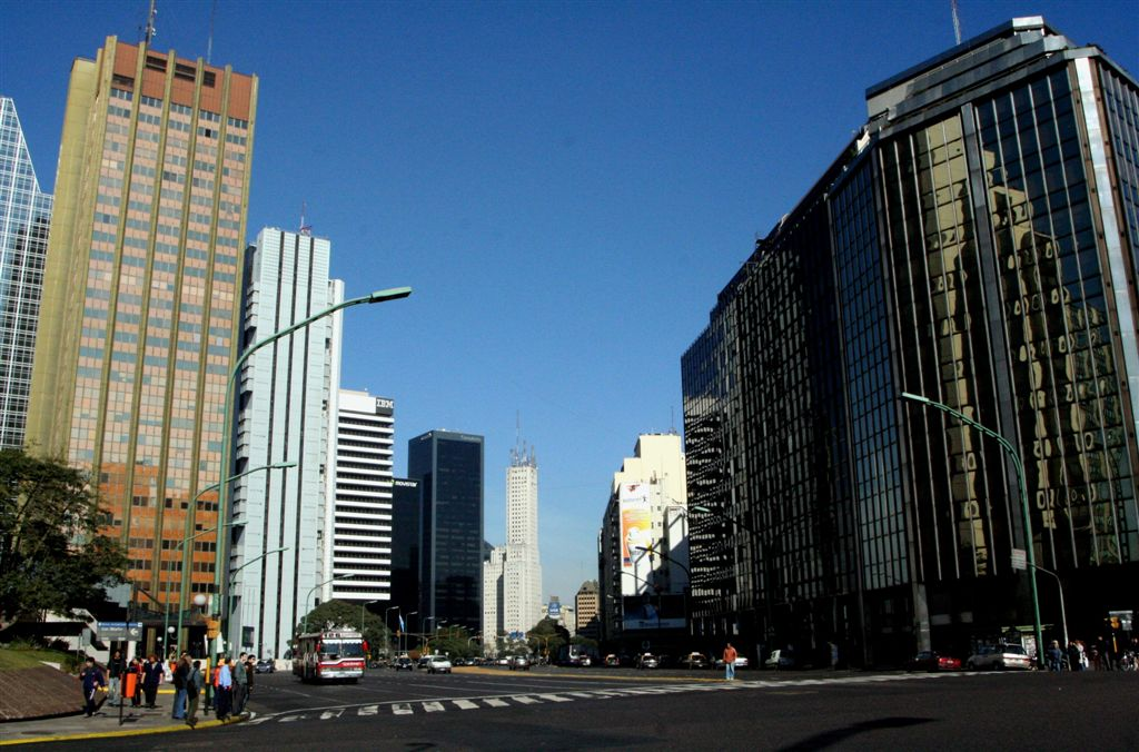 Leandro Alem Avenue, Buenos Aires.